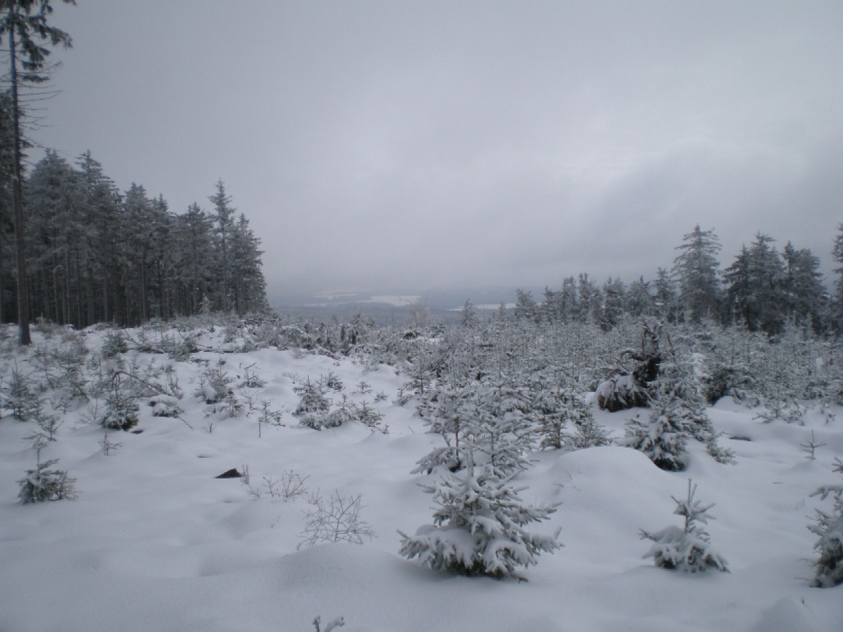 Listopad na Brdcích